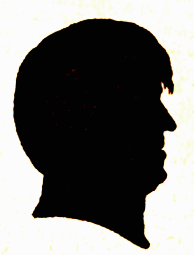 Posthum abgedruckter Scherenschnitt des am 26. Juli 1837 in München verstorbenen Herausgebers der Bayerischen Landbötin Carl Friedrich August Müller